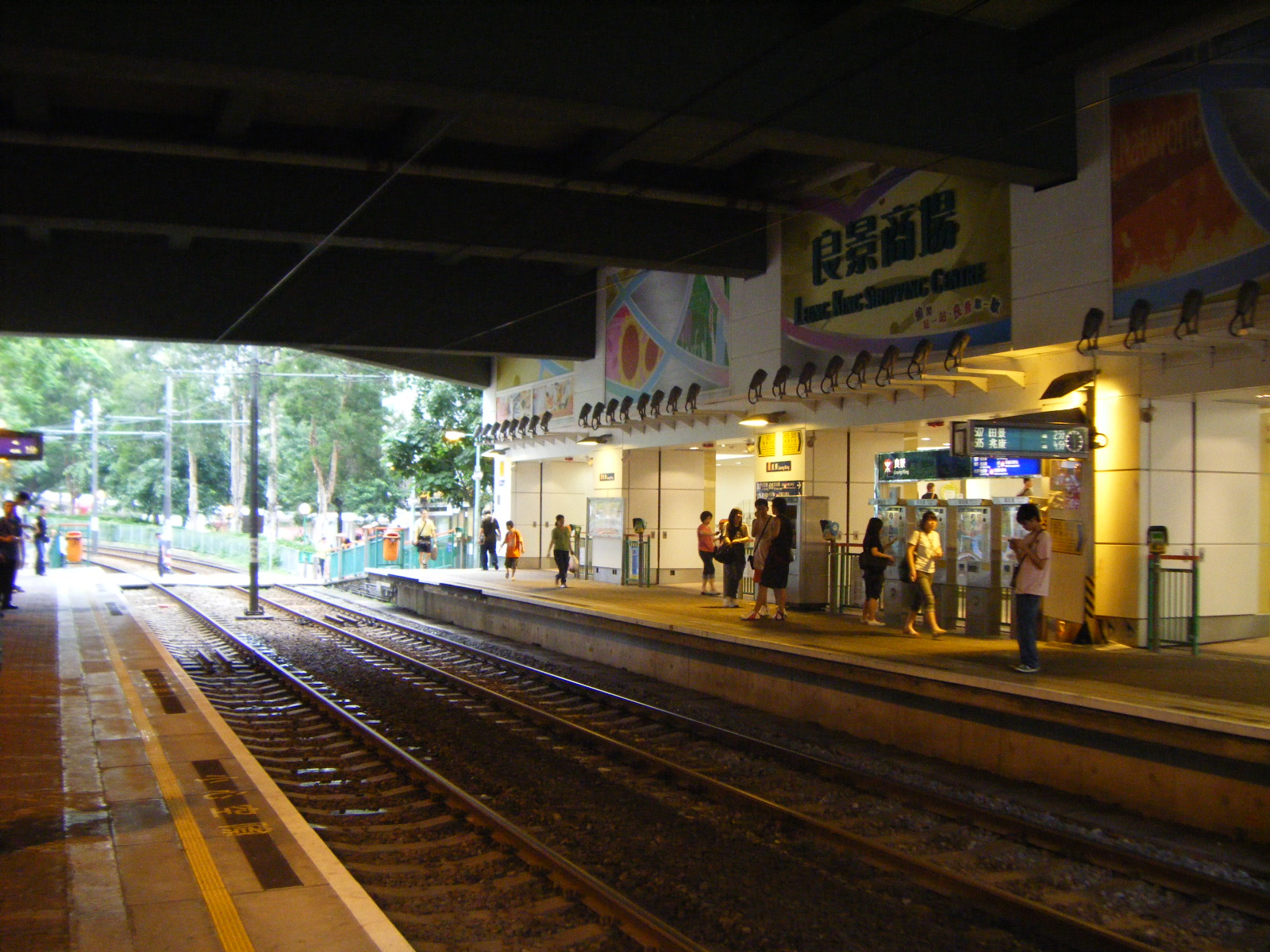 中文（香港）: 輕鐵良景站月台